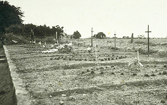 Gräber Lager Ladelund 1945